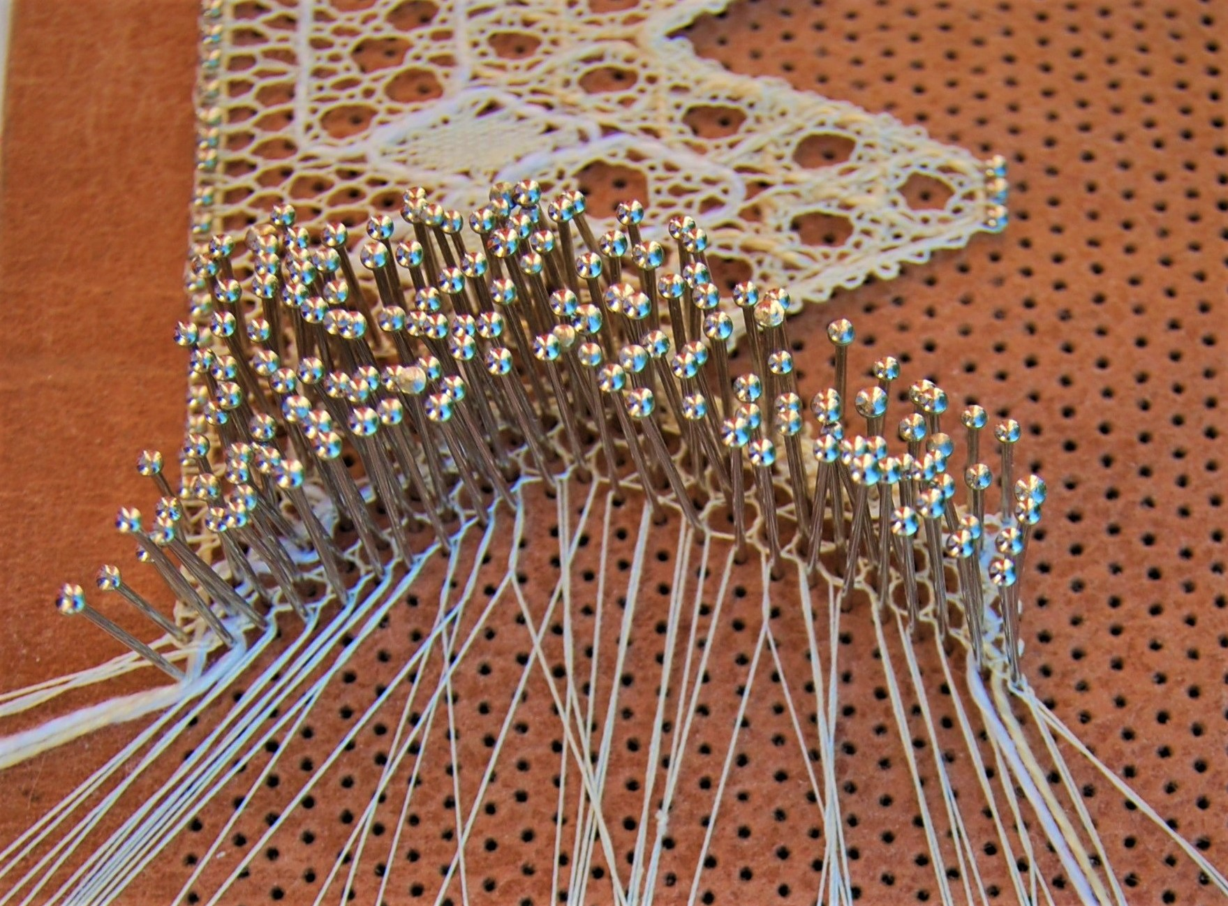 Spôsob zachytávania spletených párov nití špendlíkmi pri pletení tylu.